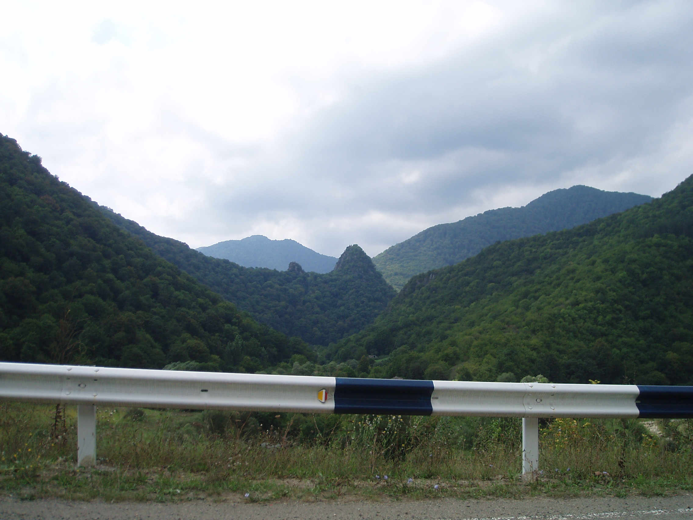 Աղջկա Քարը Տաուշի մարզի Այգեձոր գյուղի մոտակայքում 10/1